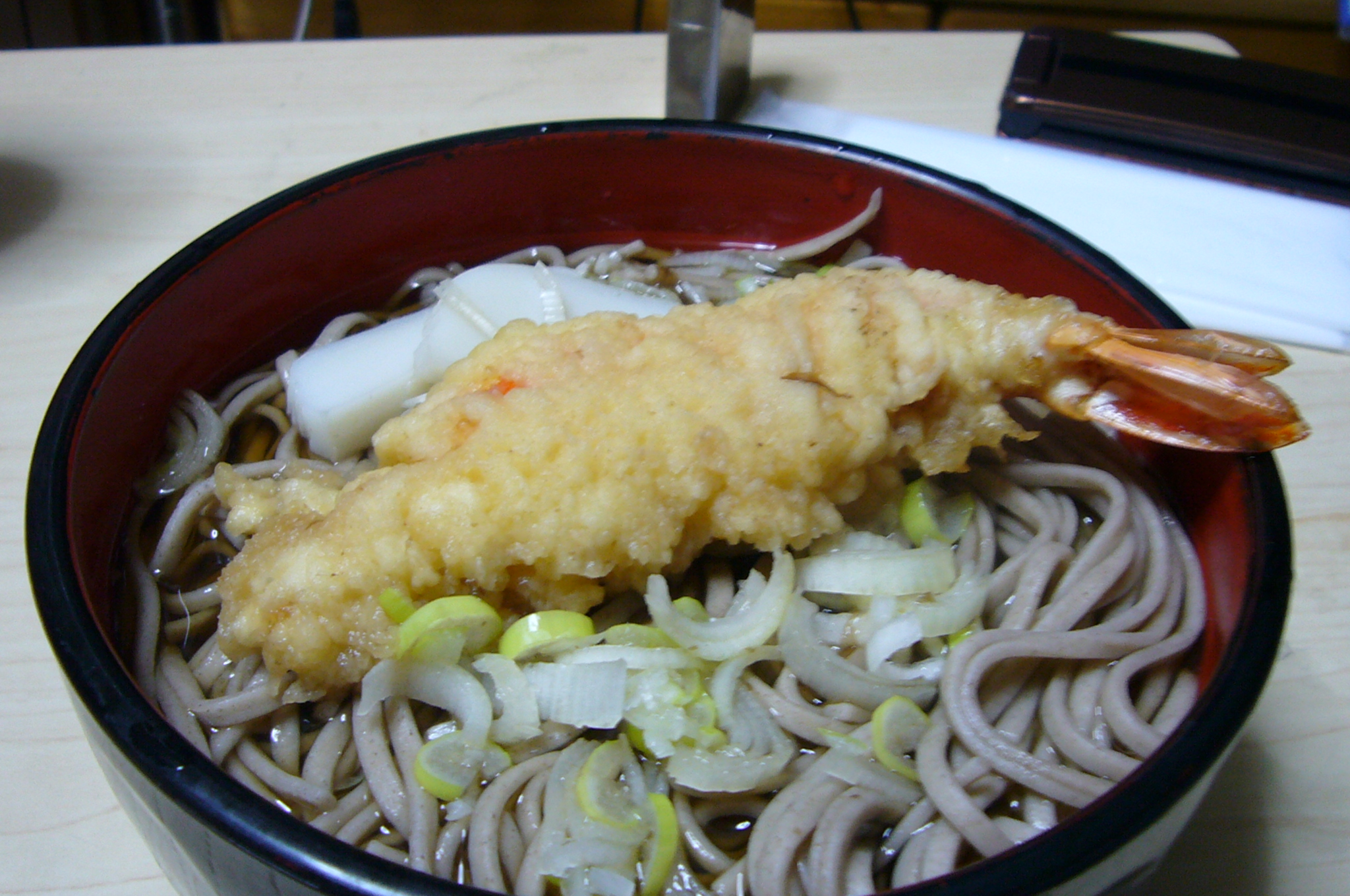 エビ天で